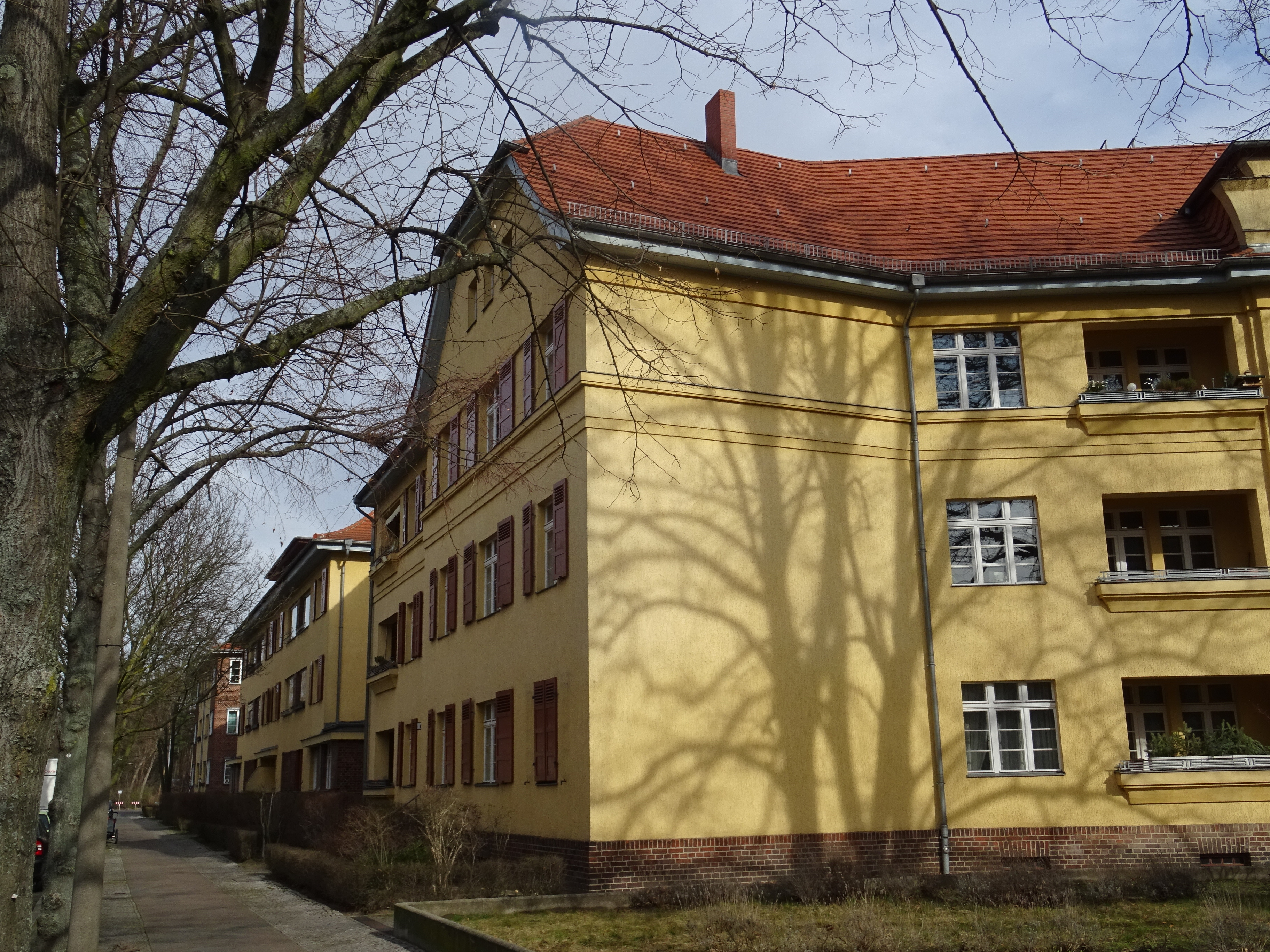 Berlin-Oberschöneweide, denkmalgeschützte GEBAG-Siedlung, Straßenzug in der Fontanestraße von der Zeppelinstraße